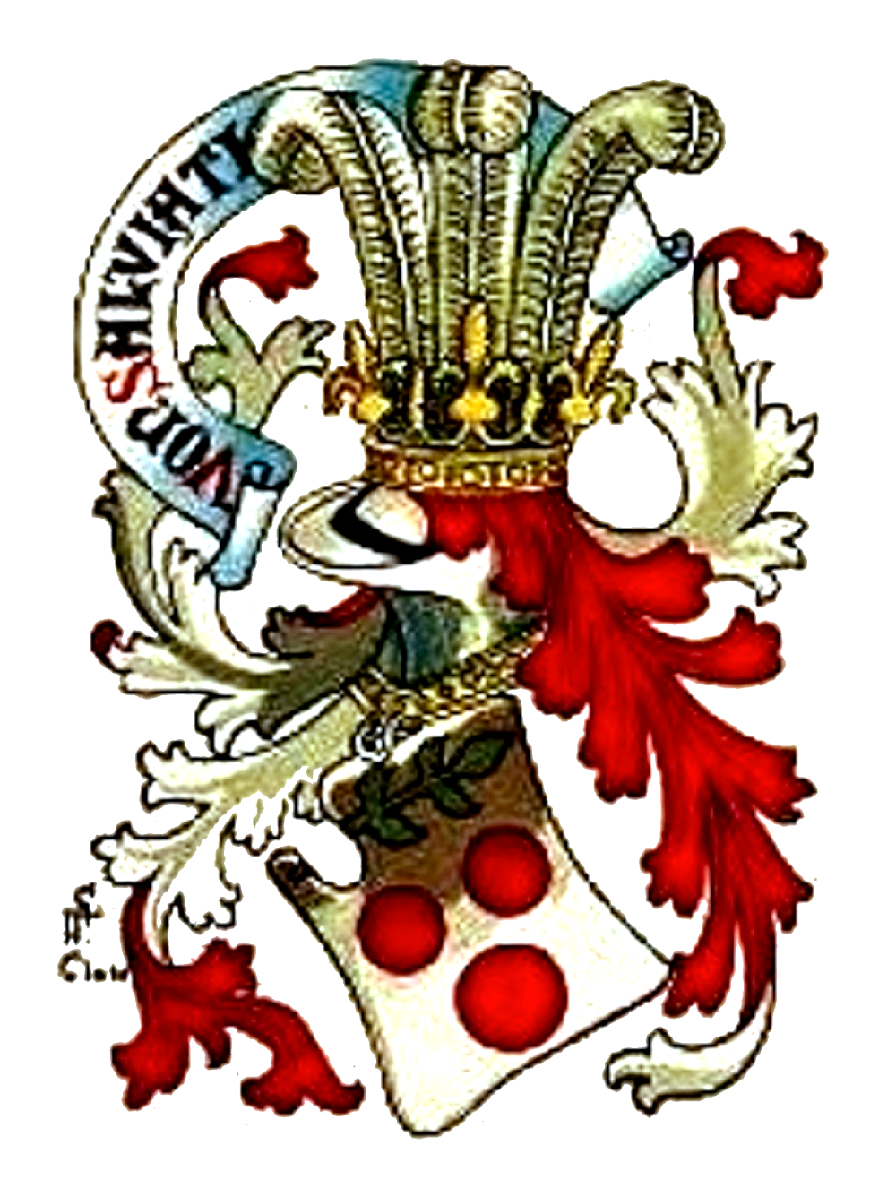 Wappen der von Salviati (→ Freiherr Leopold von Zedlitz-Neukirch, Neues preussisches Adels-Lexicon, Band 4, S.144, Digitalisat)